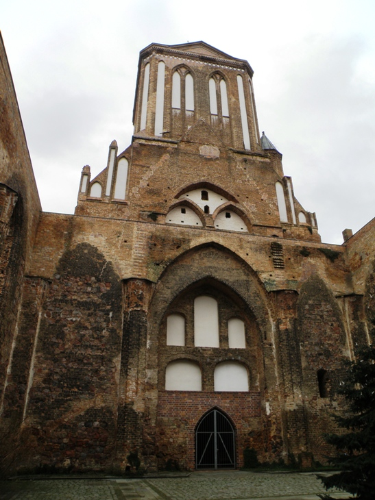 "wnętrze" kościoła